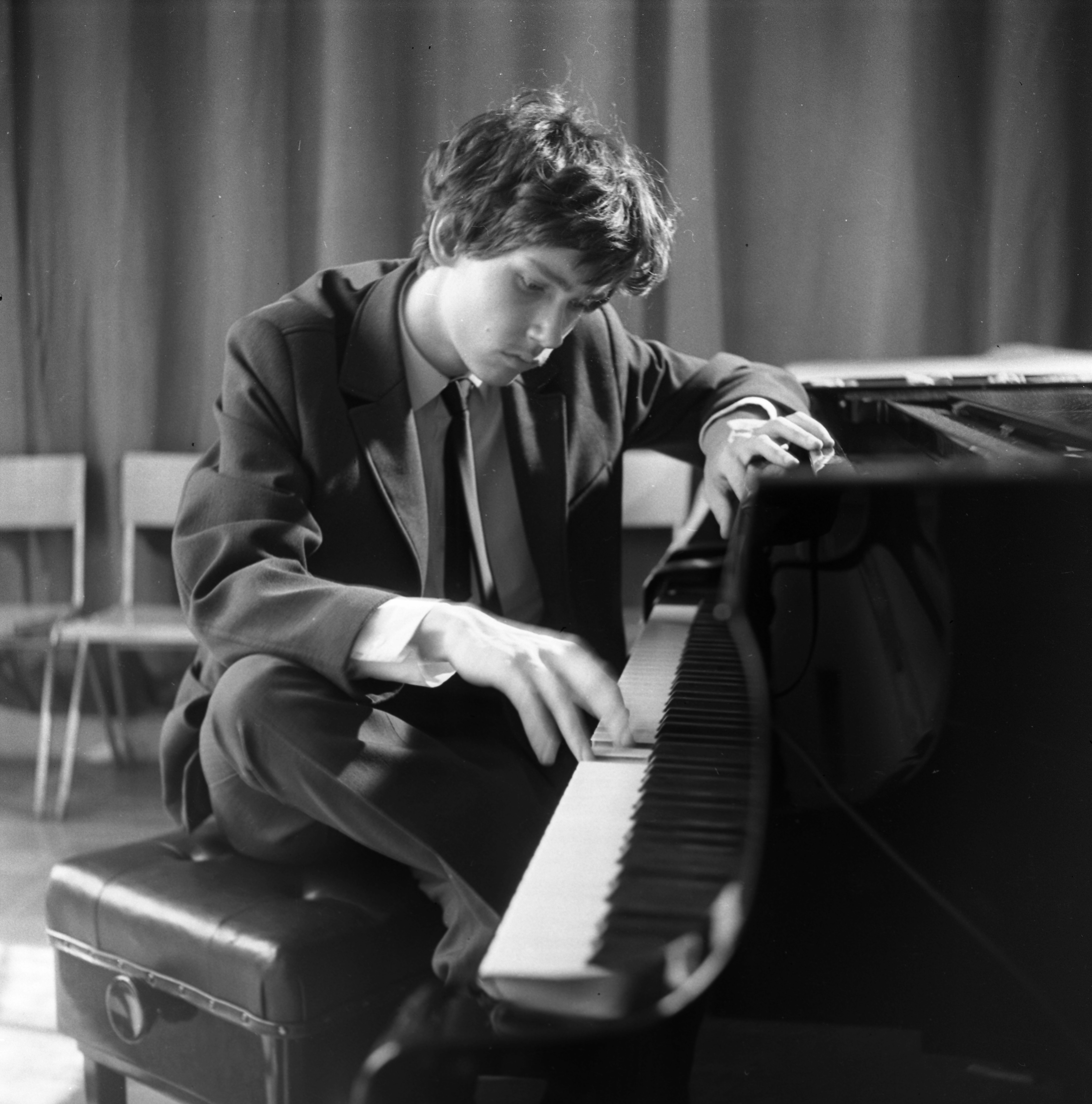 Kocsis Zoltán zongoraművész. Location: Hungary Title: Kocsis Zoltán zongoraművész.